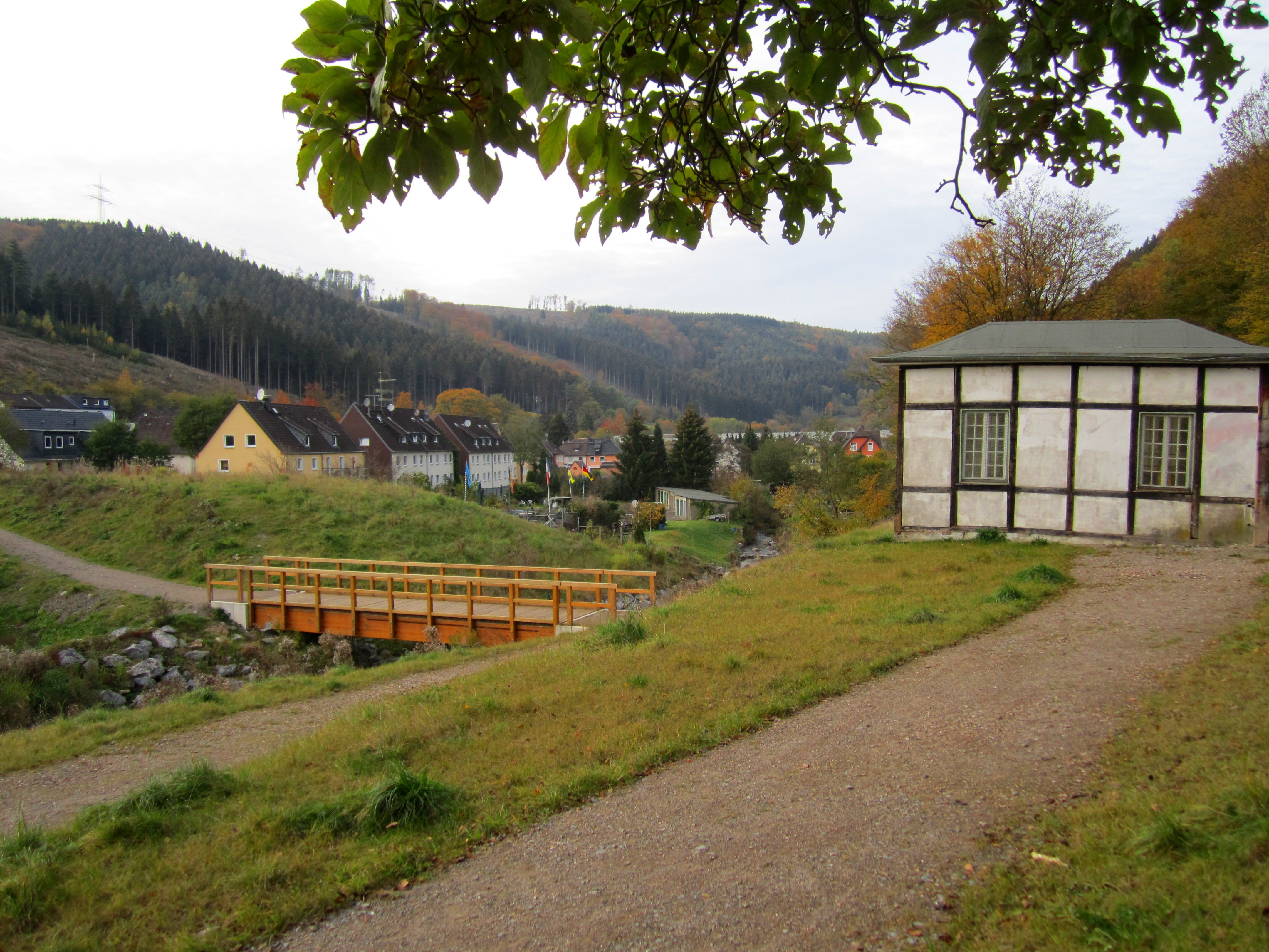 Reste des Staudamms des abgelassenen Koenigsees im Nahmertal/Hohenlimburg. Das Fachwerkhaus rechts stand am Stauwehr/Überlauf.